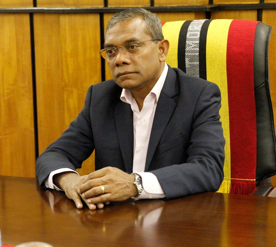 Constâncio Pinto, Minister für Handel, Industrie und Umwelt Osttimors